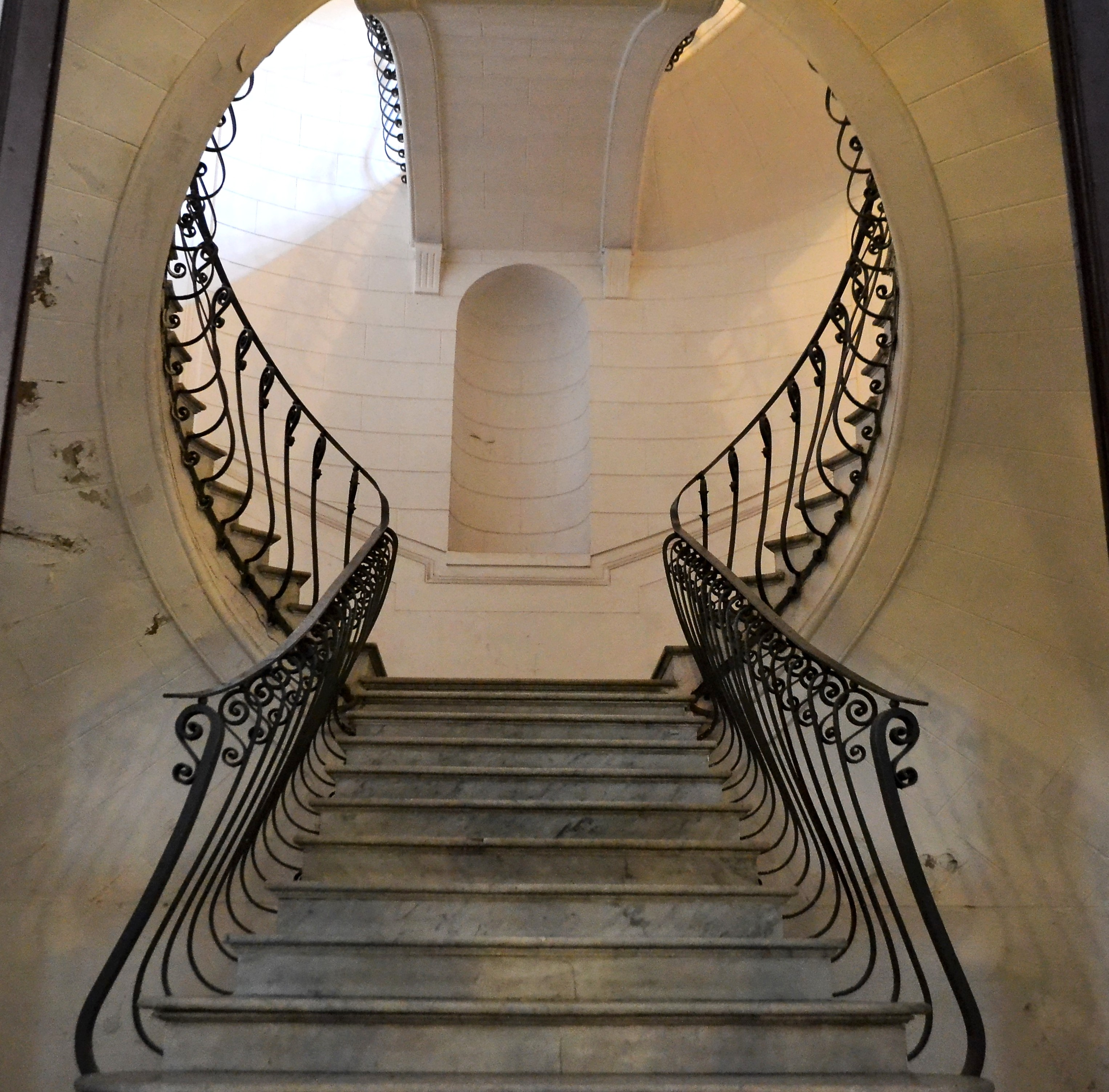 Scala particolare in un palazzo di Napoli.